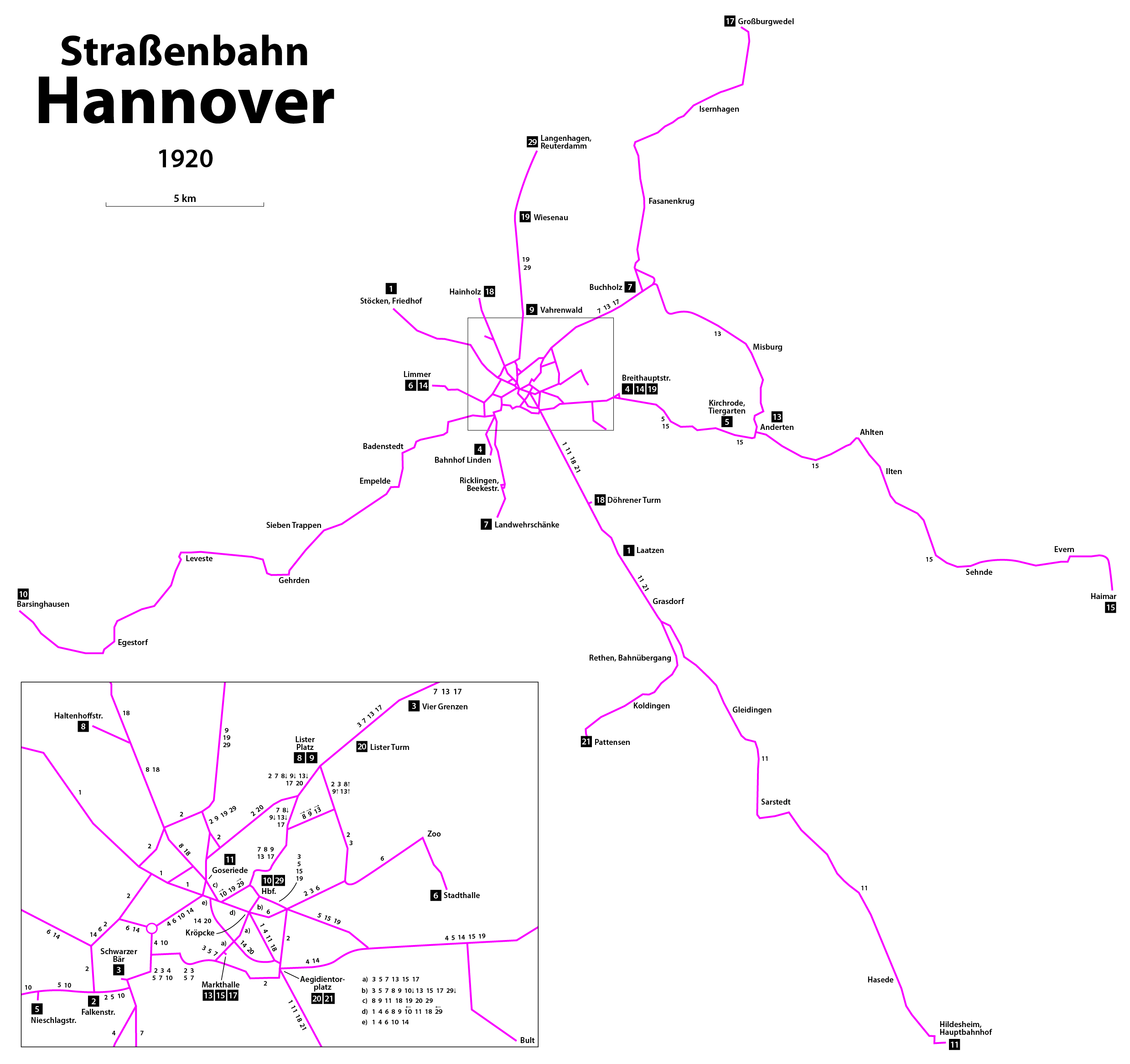 Karte der Straßenbahn Hannover im Jahr 1920